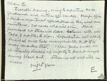 落在日方手上的滙豐大班祁禮賓，在1942年11月秘密致函惠州英軍服務團的祈德尊。